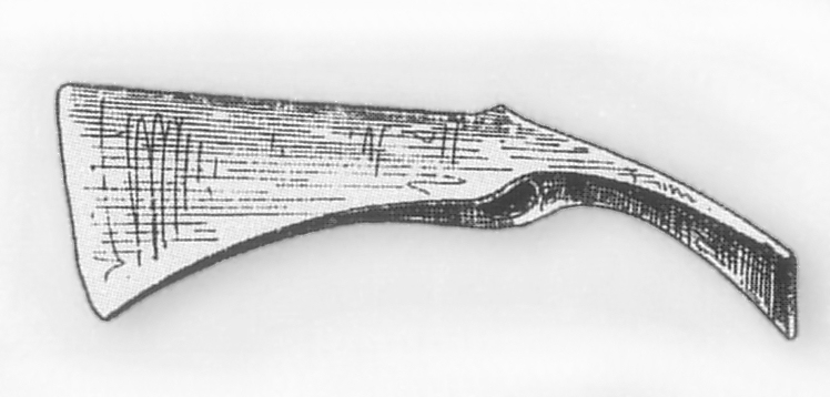 Zeichnung einer Axt, gefunden beim Burgwall Hedemünden